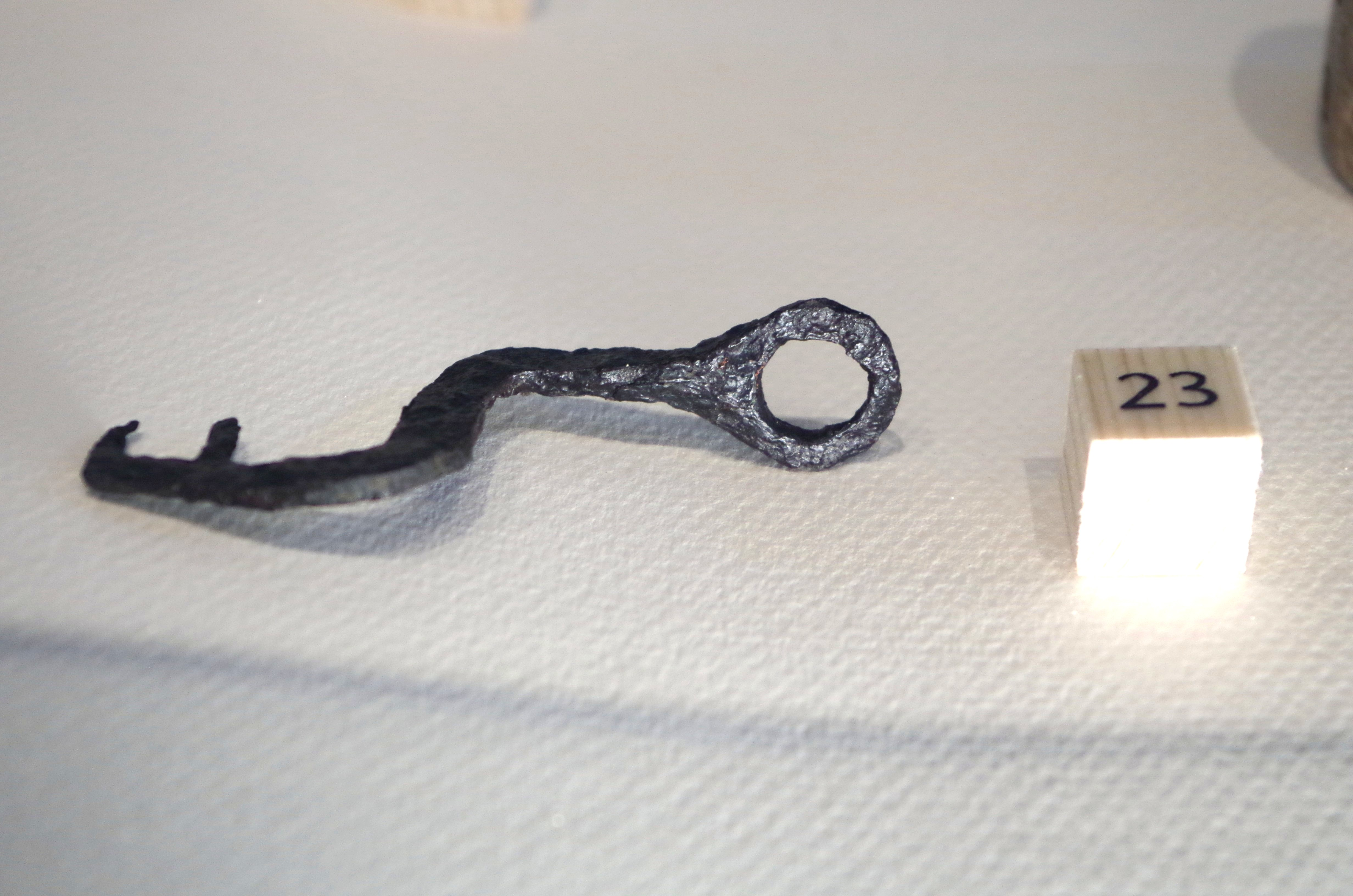 Cler en fer à deux dents trouvée à Amboise. Voir Jean-Marie Laruaz (dir.), Ambacia, la Gauloise - 100 objets racontent la ville antique d'Amboise, Chemillé-sur-Dême, Archéa, 2017, p. 64.